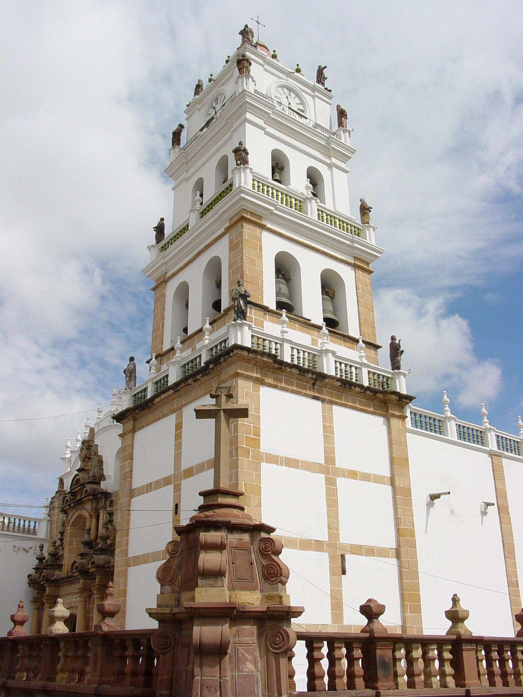 Sucre, Bolivia